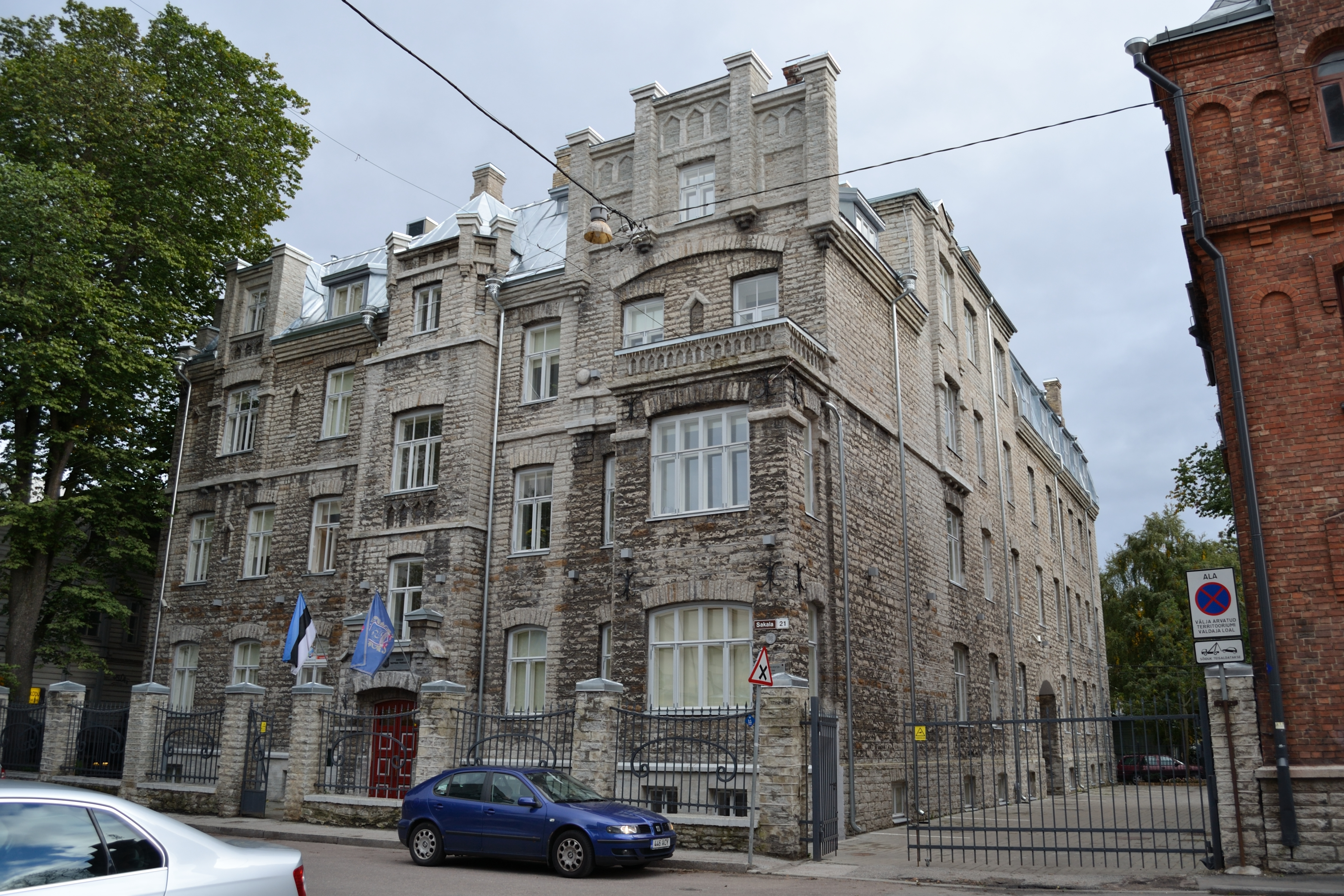 Tallinn, elamu, 1905. a. ja Tallinna Linna Poeglaste Kaubanduskooli hoone